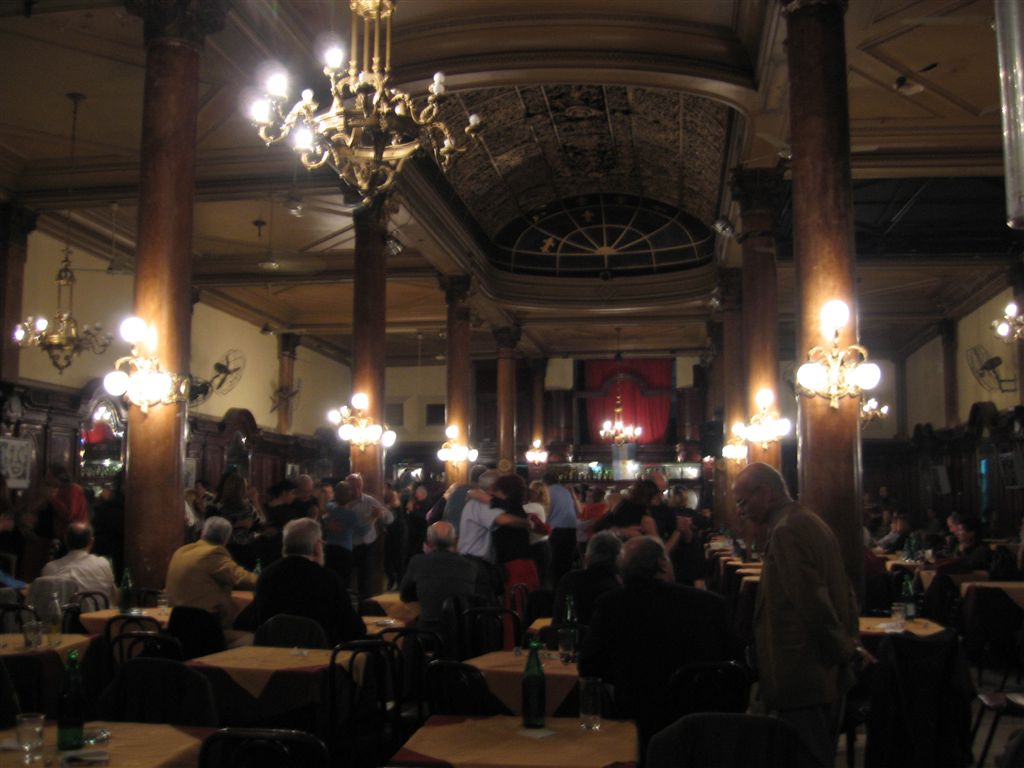 Confitería La Ideal, 384 Suipacha Street, Buenos Aires.